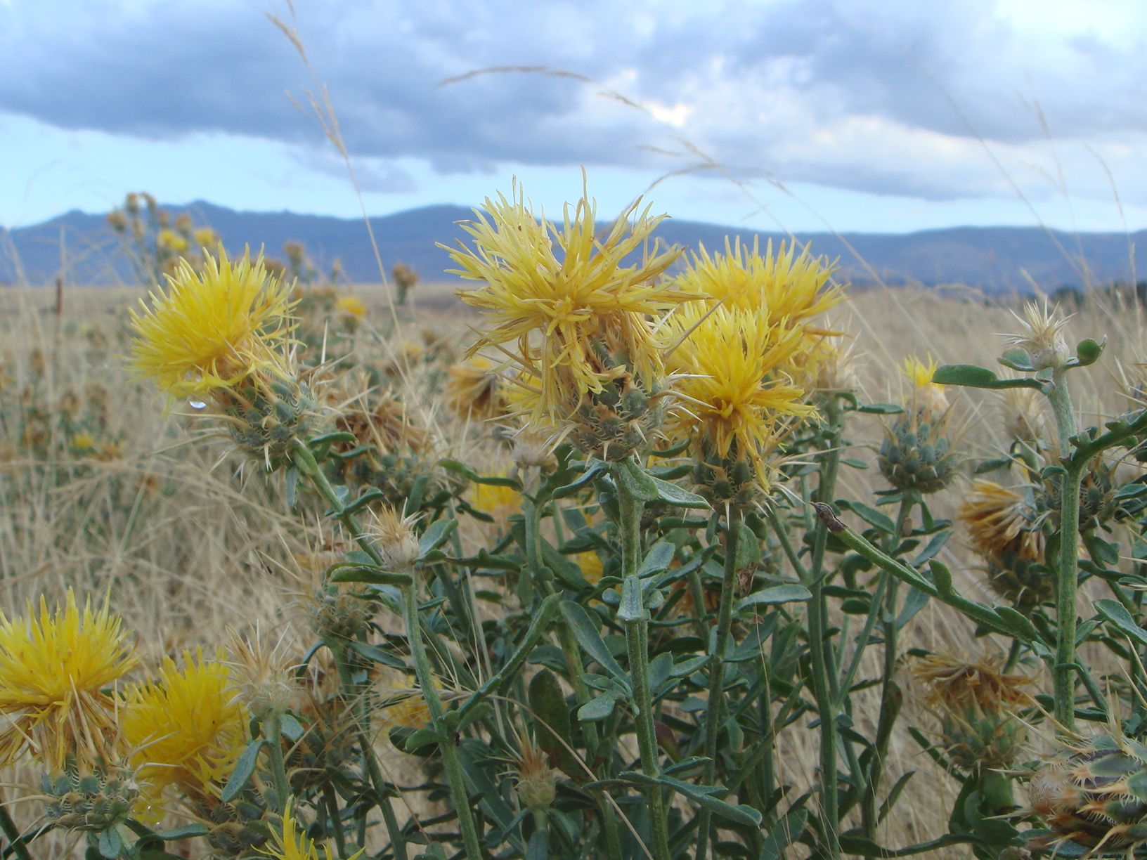 Centaurea ornata Willd. subsp. ornata. La Torre (Ávila), España